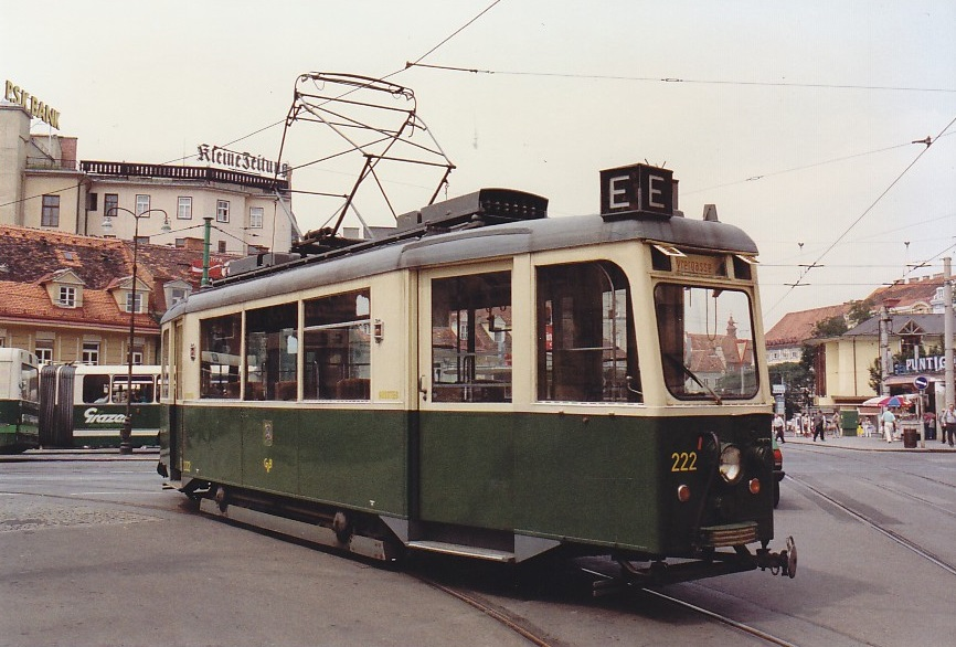 Wagen 222, Mai 1989. Als E-Wagen zwischen Jakominiplatz und Steyrergasse im Einsatz.